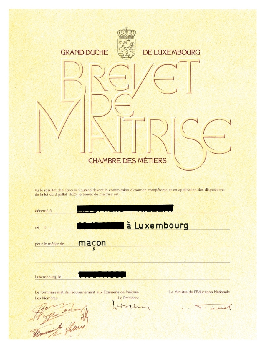 Luxemburgischer Meisterbrief eines Maurers